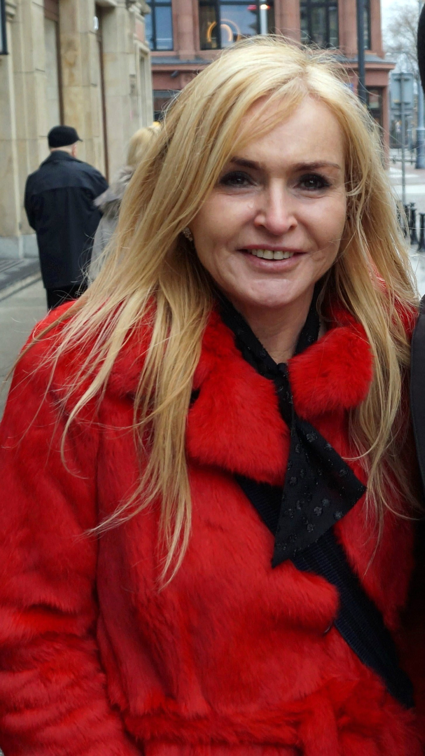 Monika Olejnik, dziennikarka.